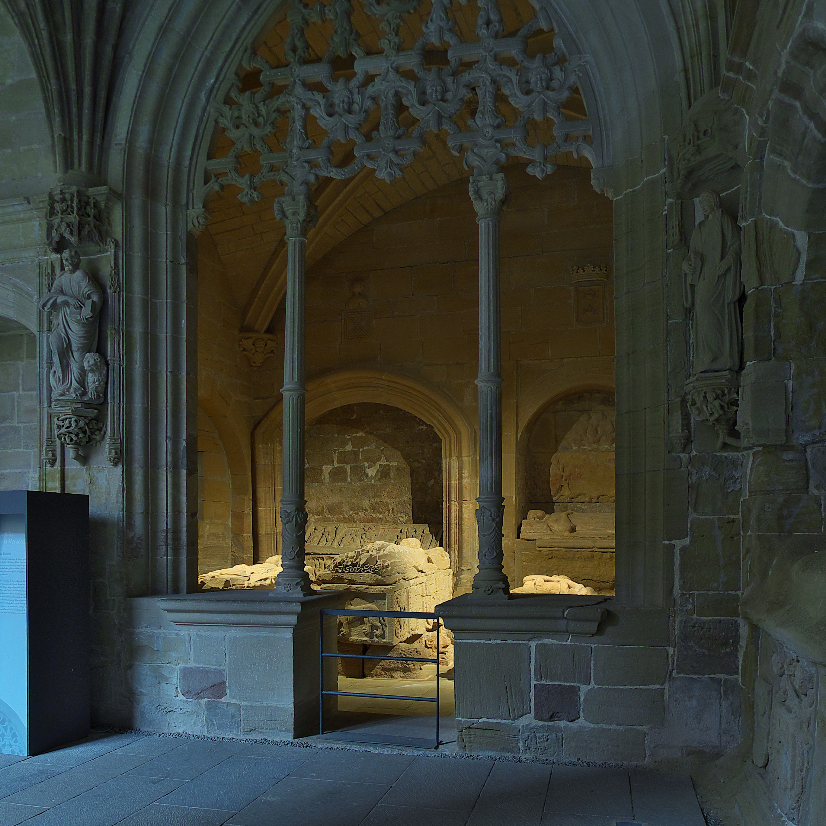 Monasterio de Santa María la Real de Nájera. Mencía Lopez de Haro (+1272), hija de Lope Díaz II de Haro y de Urraca Alfonso de León, manda construir la Capilla de la Vera Cruz, en el claustro del monasterio, la capilla funeraria de la Casa de Haro. También están enterrados, Garci Lasso Ruiz de la Vega (+1367); Diego López de Salcedo (†1239);Lope Díaz de Haro (†1271), obispo de Sigüenza, y Gómez Manrique de Lara.